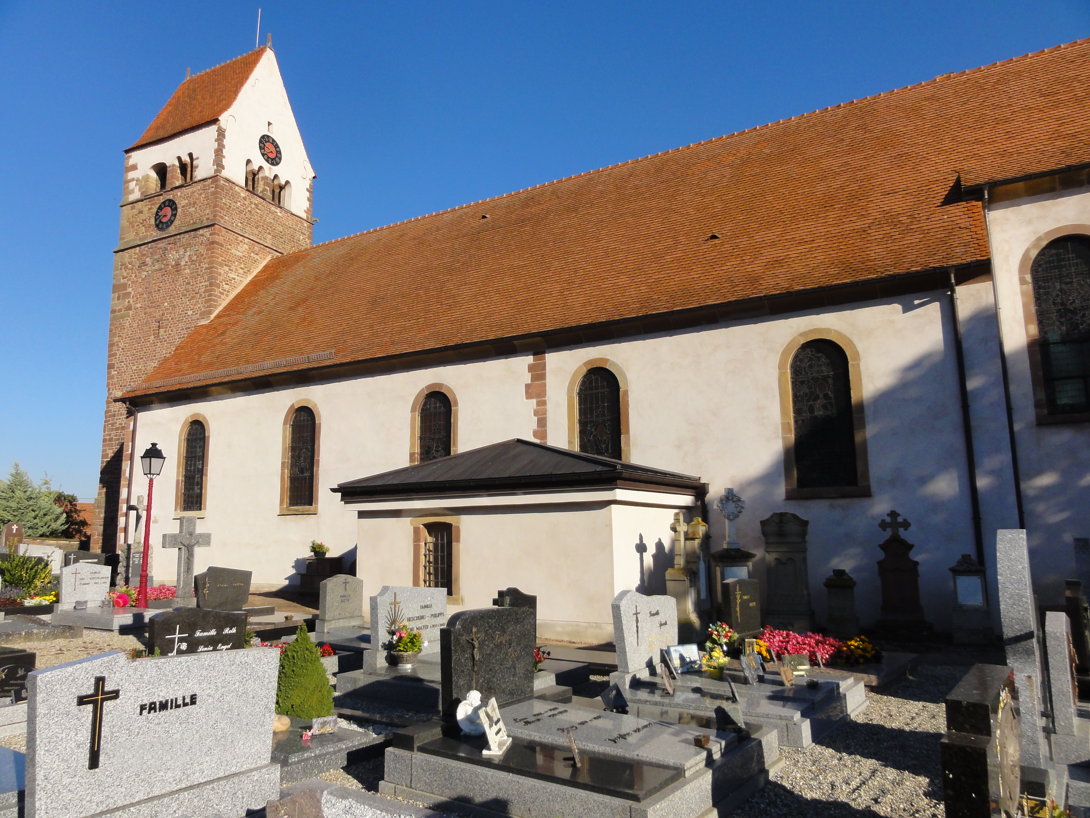 Alsace, Bas-Rhin, Saessolsheim, Église Saint-Jean-Baptiste (PA67000005, IA67009190).